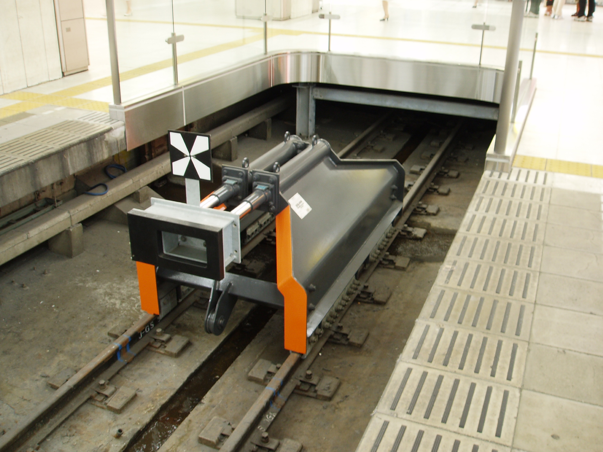 End sign at Shinjuku Sta.,Odakyu